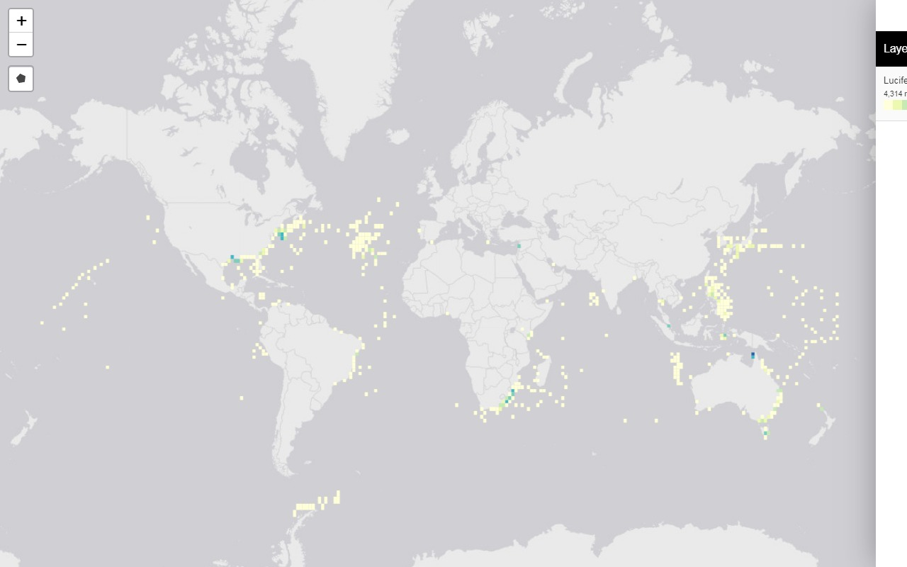 Mapa da distribuição mundial de Luciferidae, retirado de OBIS